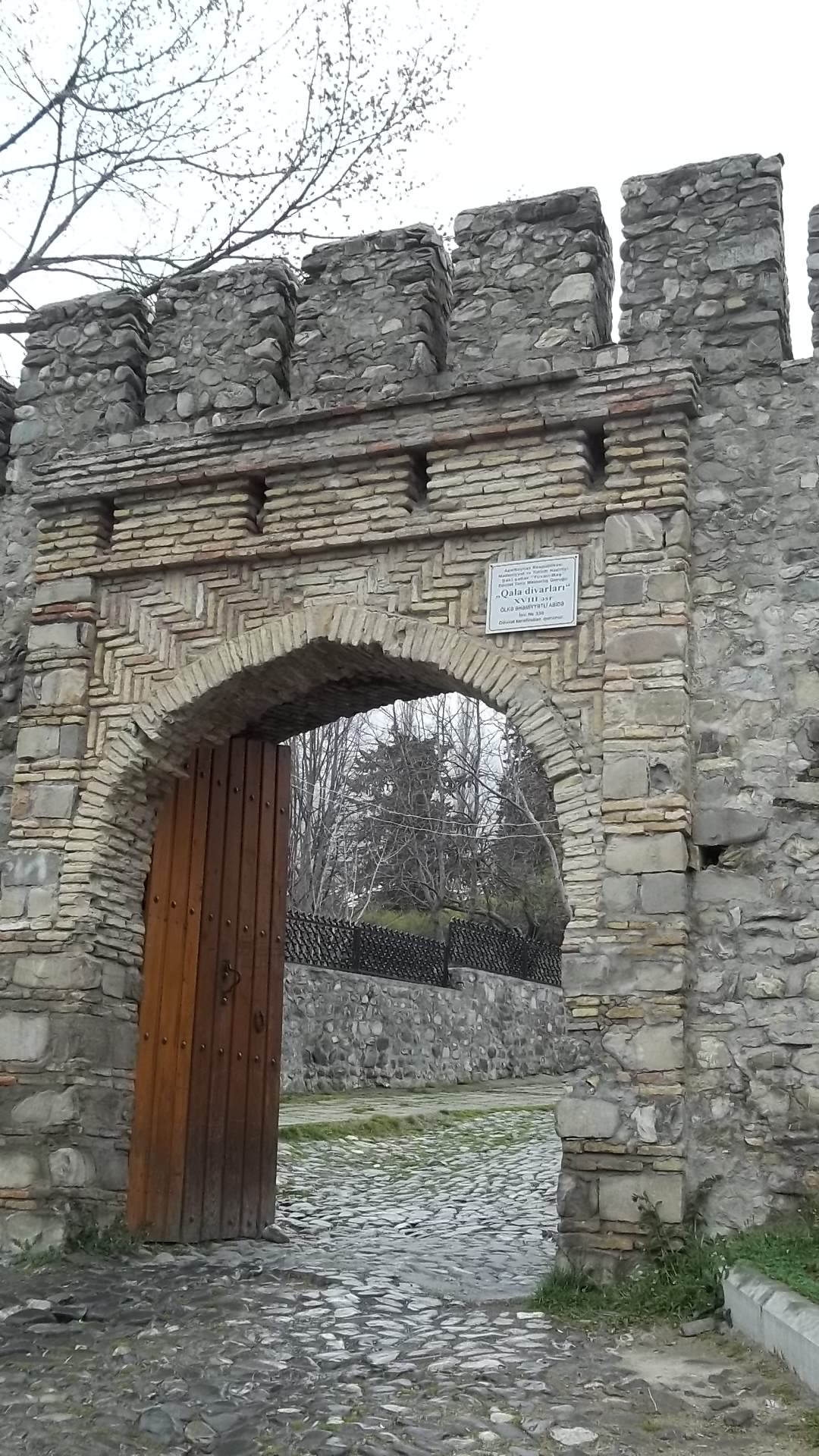 Нухинская крепость, Южные ворота (2015)